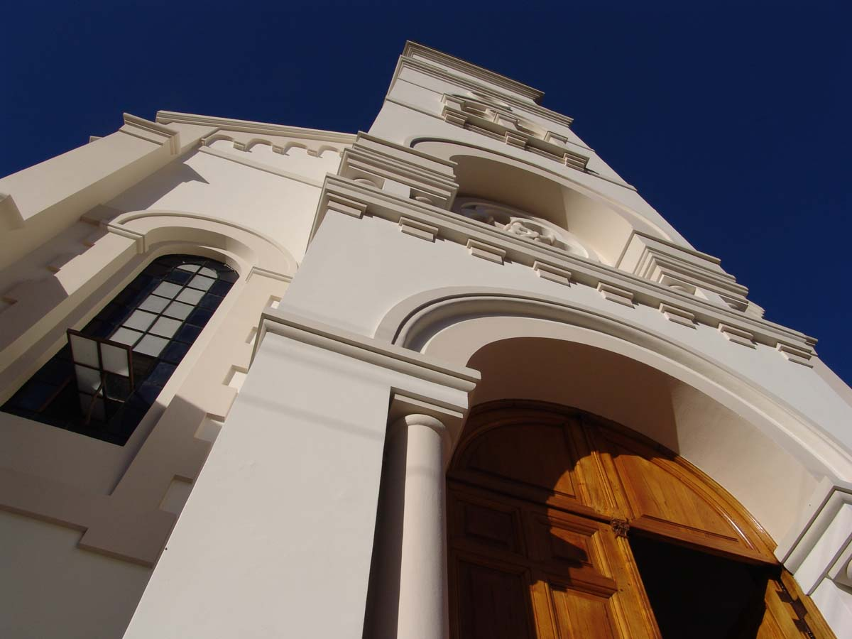 valle inferior del rio chubut